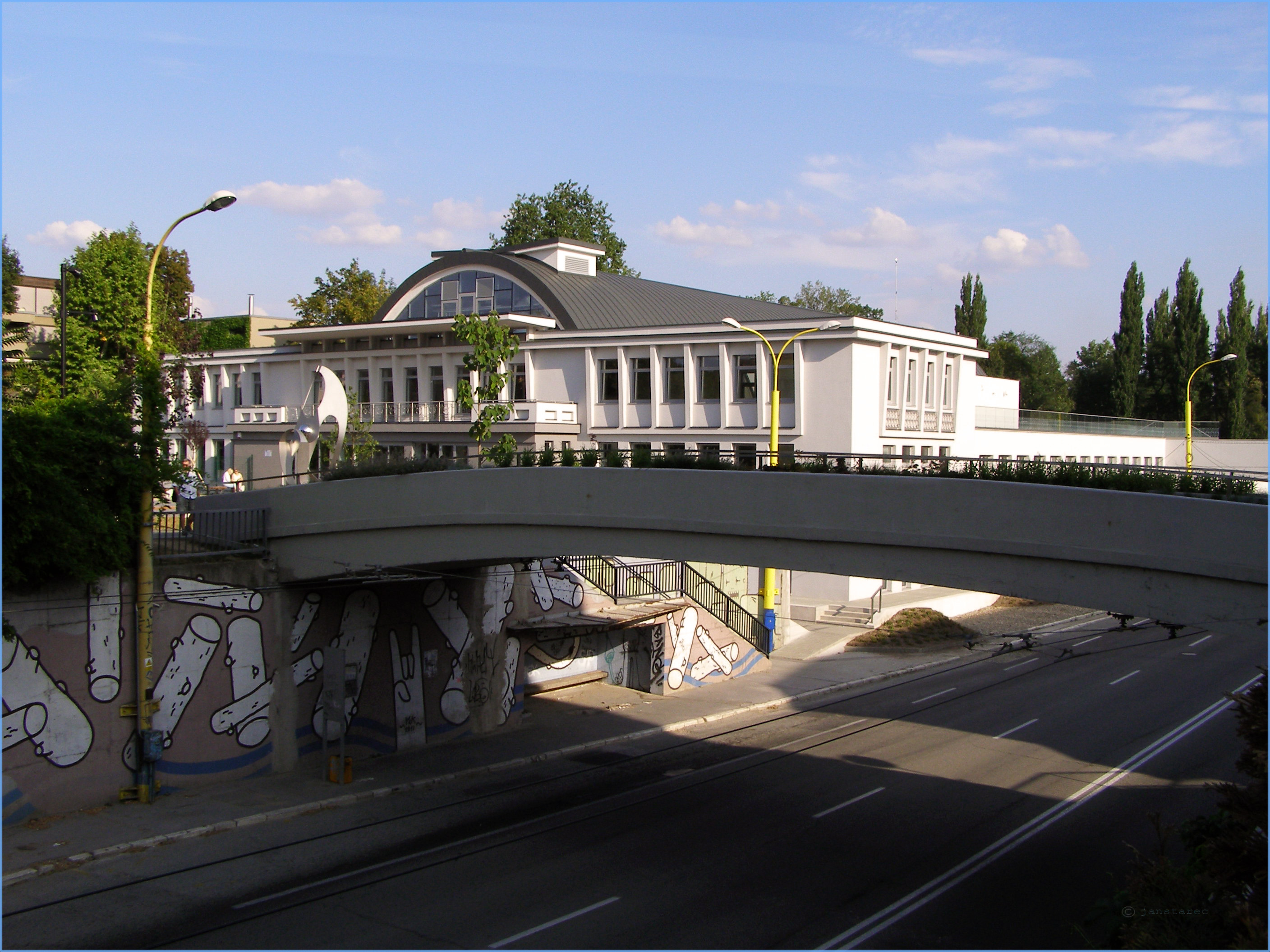 Kunsthalle